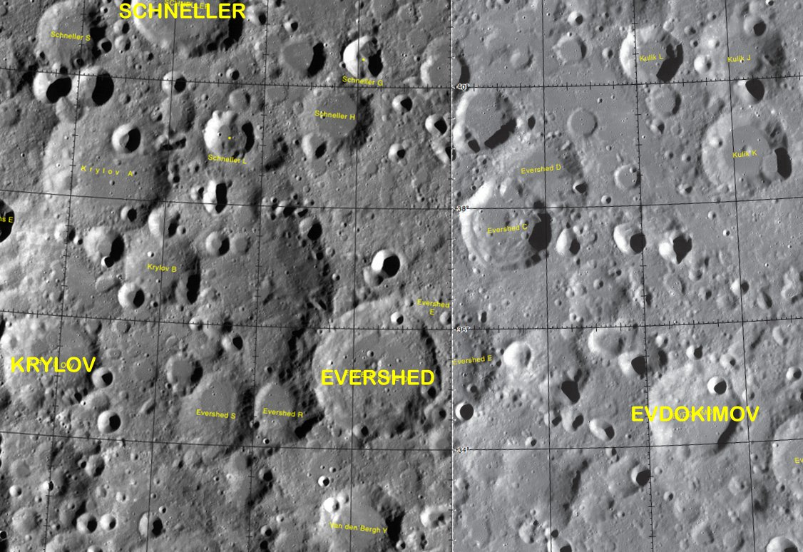 Cráter Evershed. Localización (Imagen LROC)